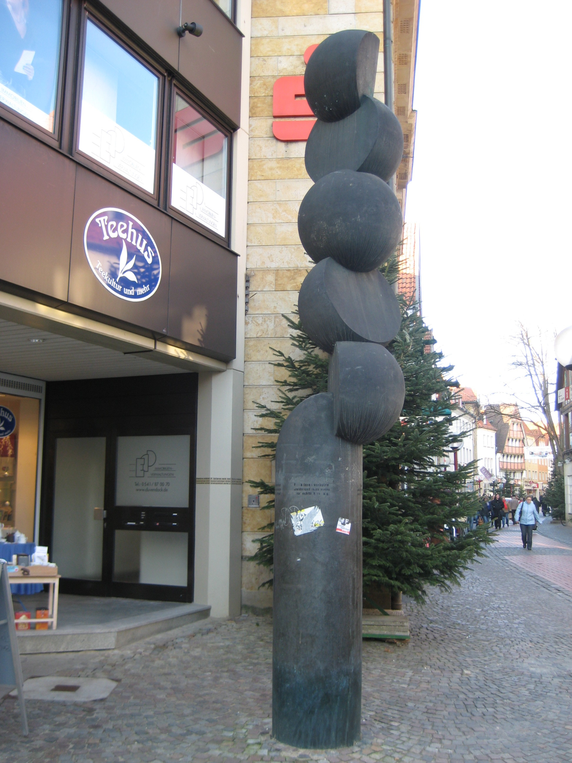 Heinz Heiber (1928–2003): Plastik Lebensbaum in Osnabrück, Bronze, 1977